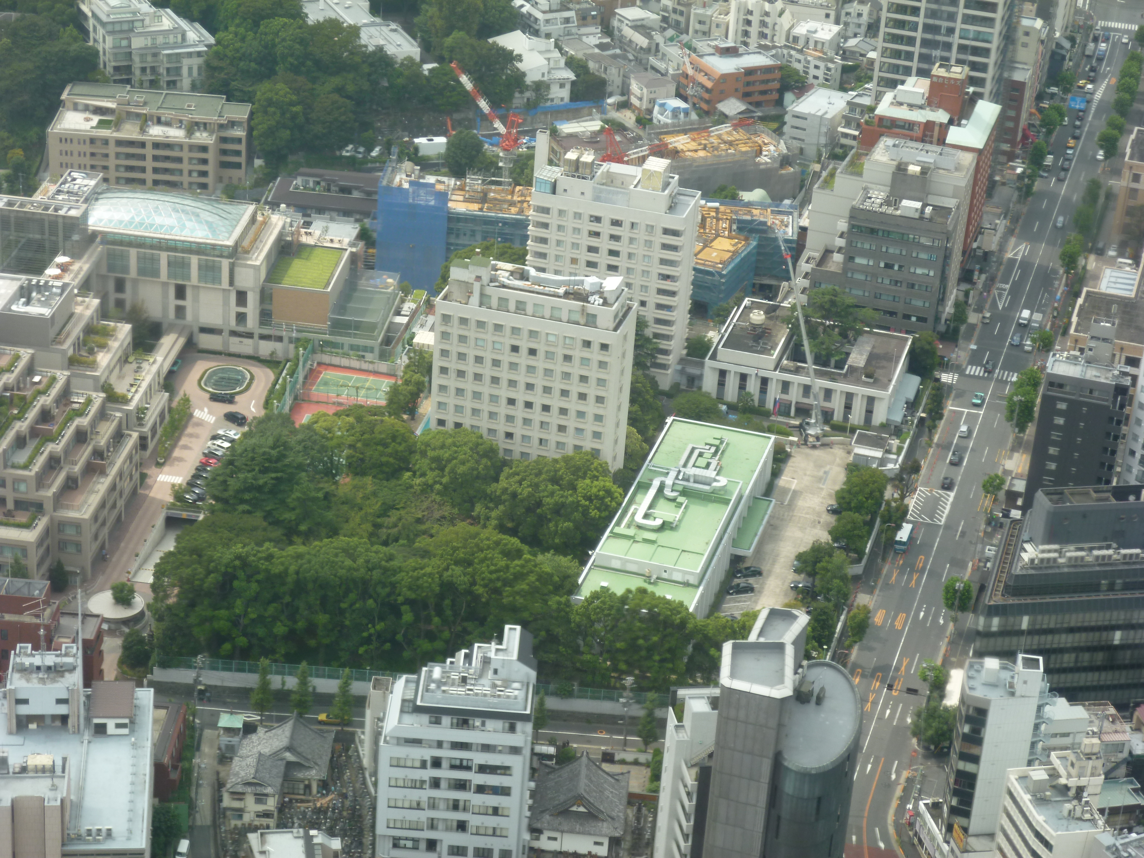 Российское посольство в Токио, вид с телебашни